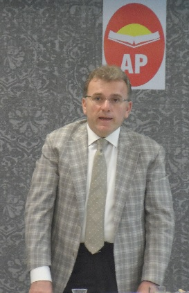 Adalet Partisi Vecdet Öz